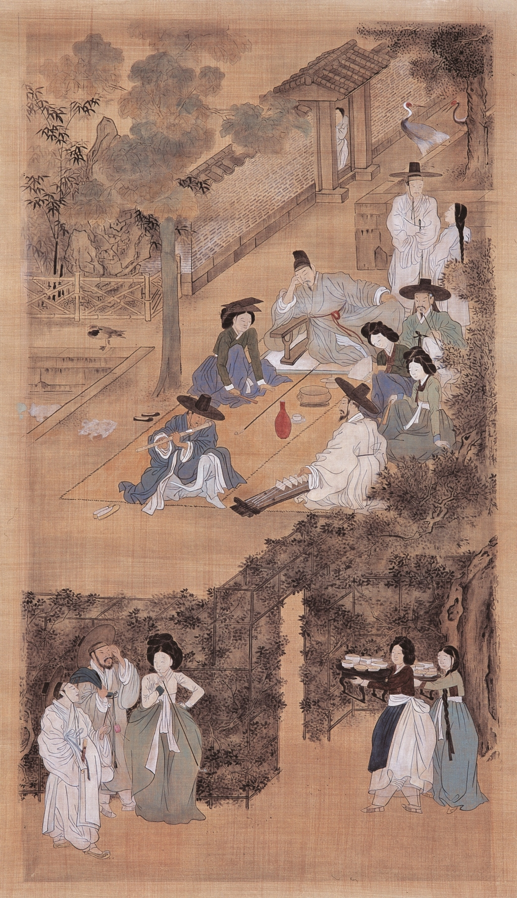 후원유연(後園遊宴)